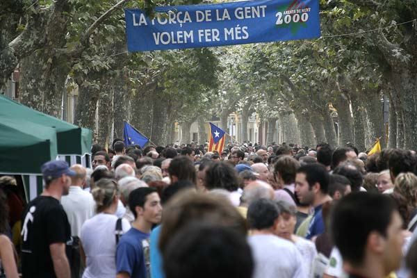 La riera d'Arenys de Munt el 13-09-2009.